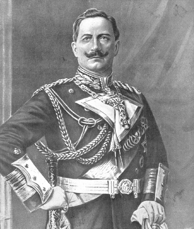 Retrato del Kaiser Guillermo II de Alemania publicado en 1914 con motivo del inicio de la Gran Guerra